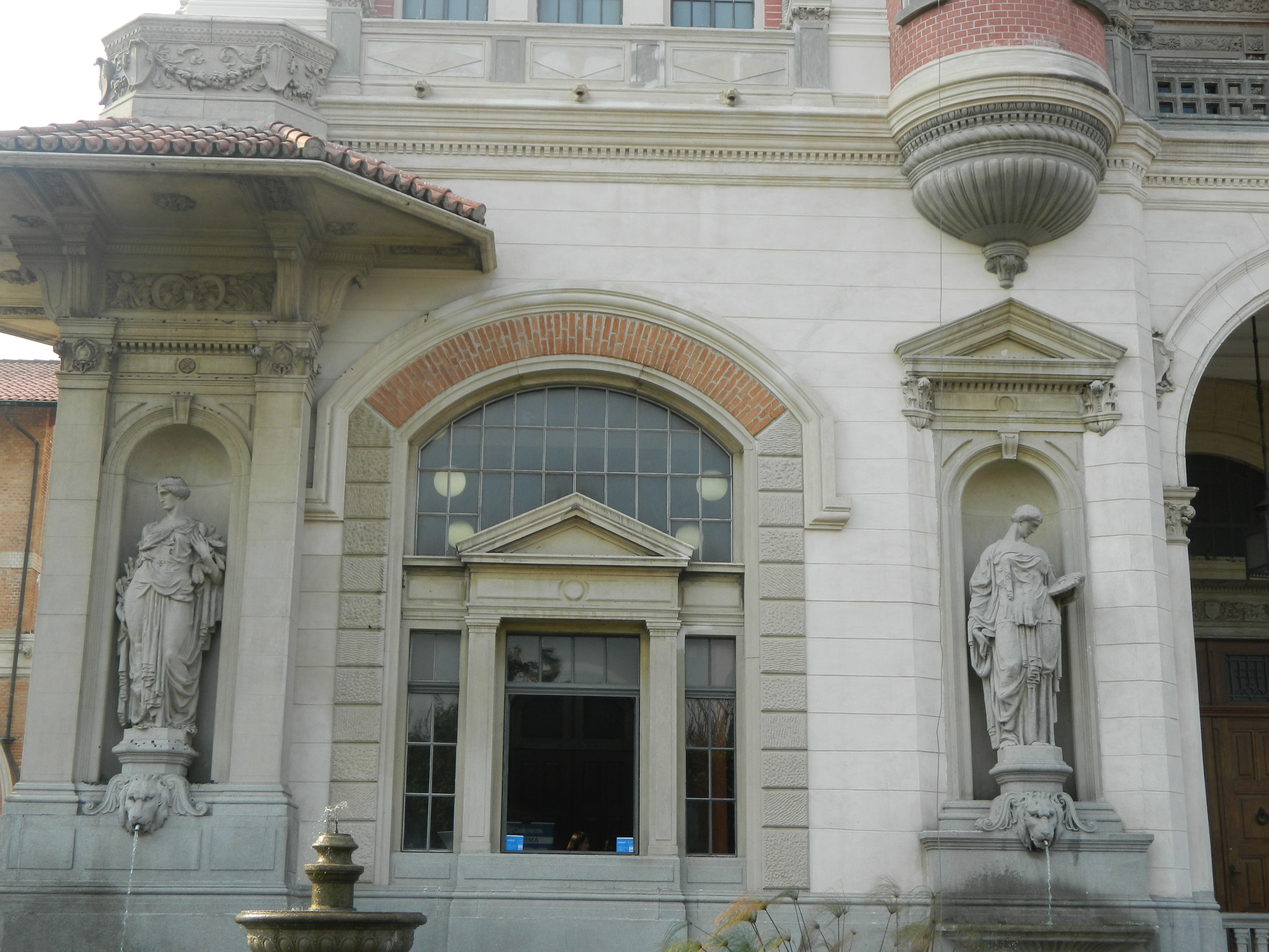 Fachada principal do Palácio das Indústrias, contendo duas estátuas em São Paulo (SP), Brasil